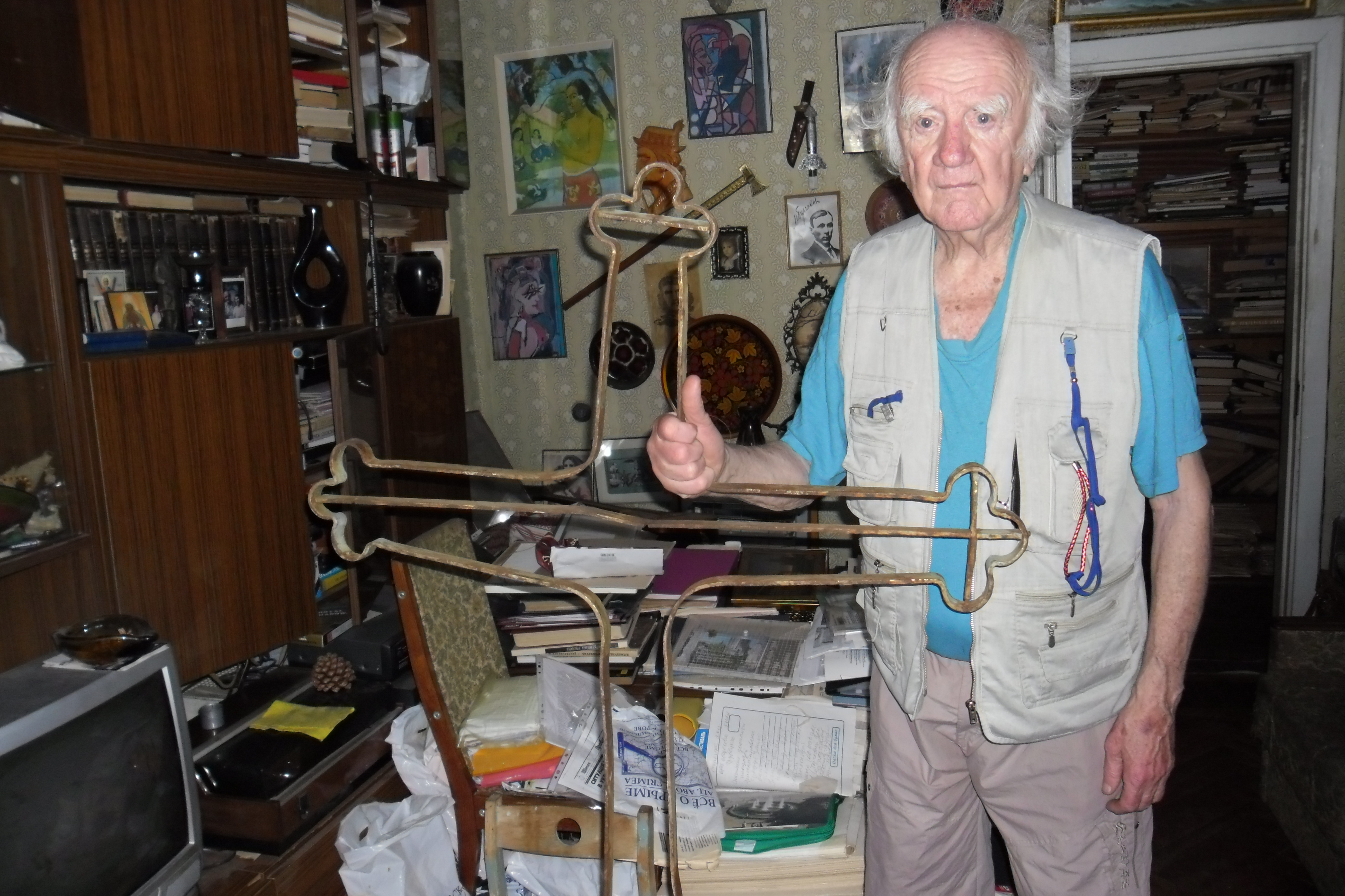 Навроцький В.